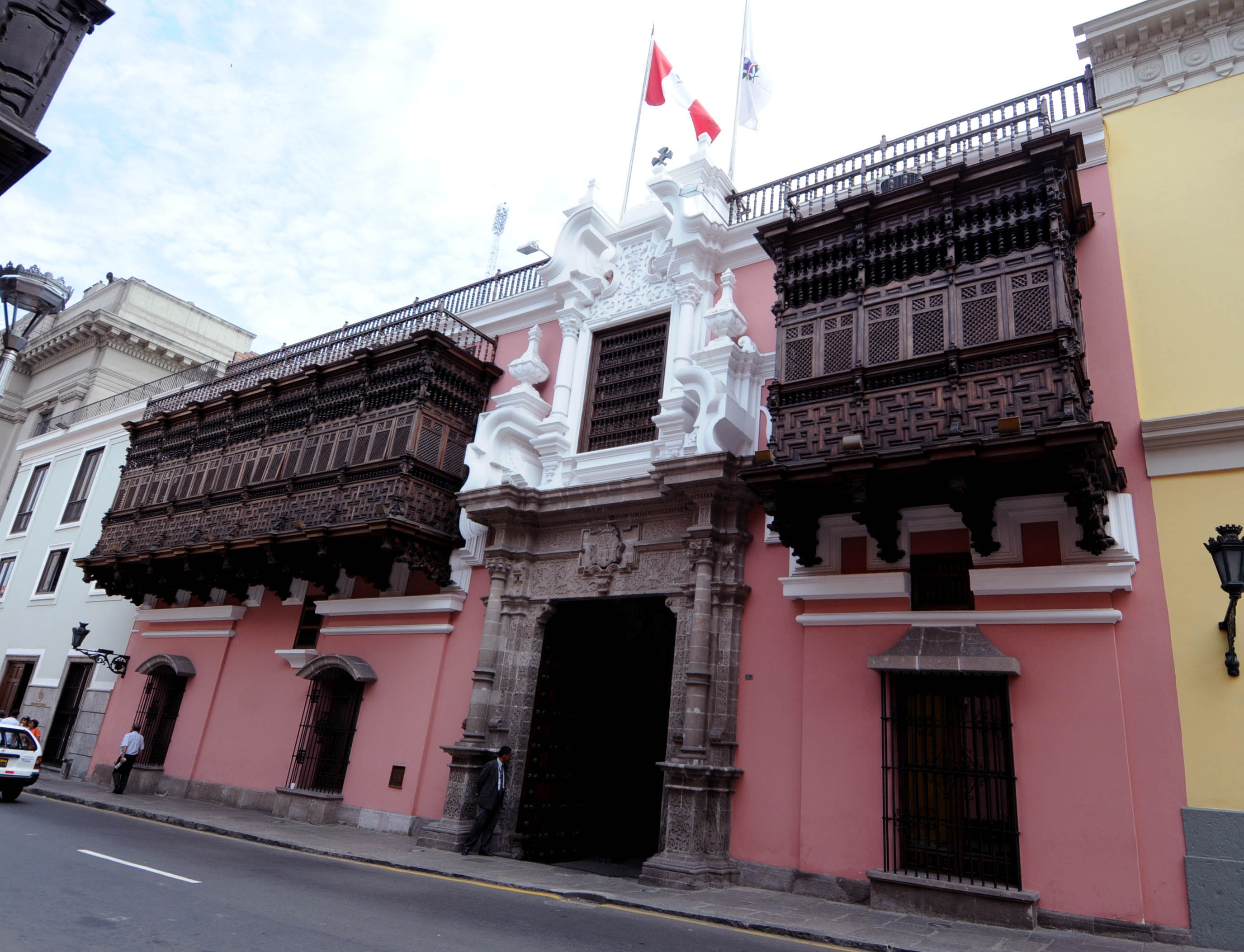 El Palacio de Torre Tagle es una extraordinaria expresión arquitectónica del virreinato y actualmente es sede de la Cancillería del Perú